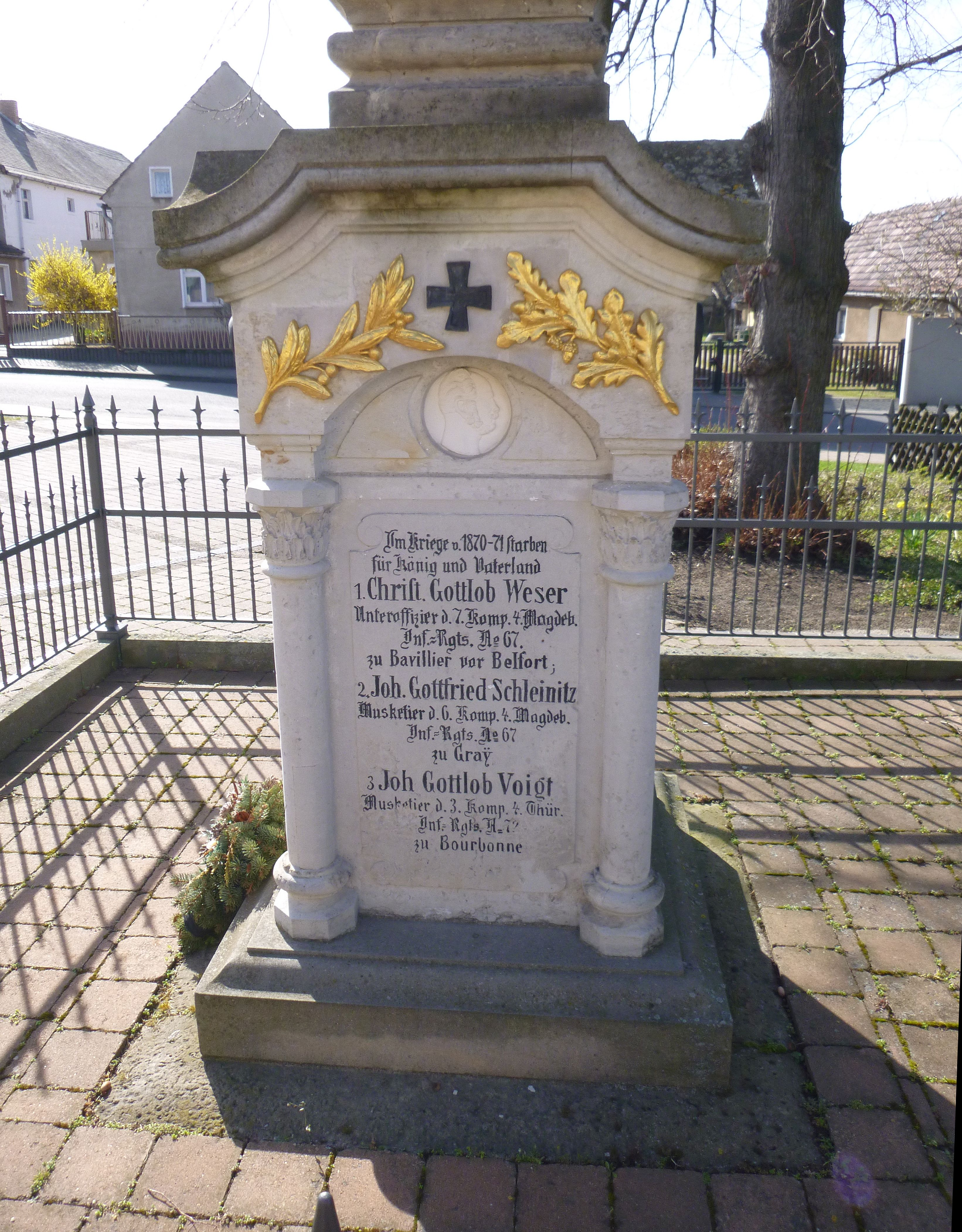 Kriegerdenkmal Gröden